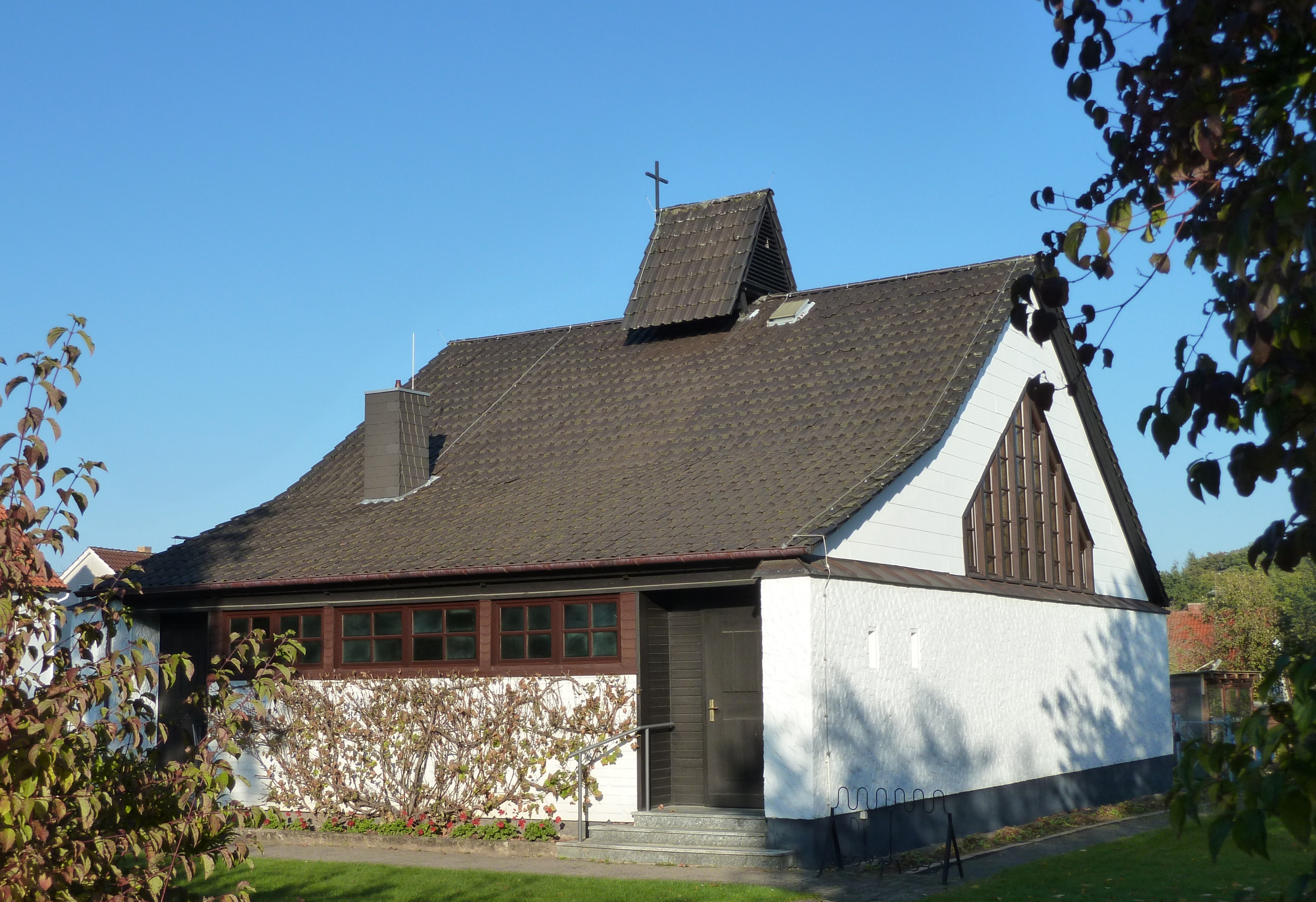 Ev.-luth. Pauluskirche in Bilshausen, Südniedersachsen. Erbaut 1951 nach Plänen von Otto Bartning